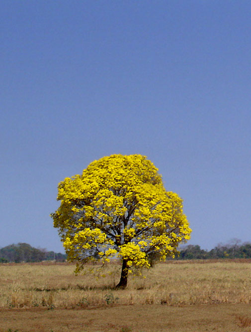 Ipê-amarelo (portuguese), or Brazilian Tabebuia, picture taken in central Brazil